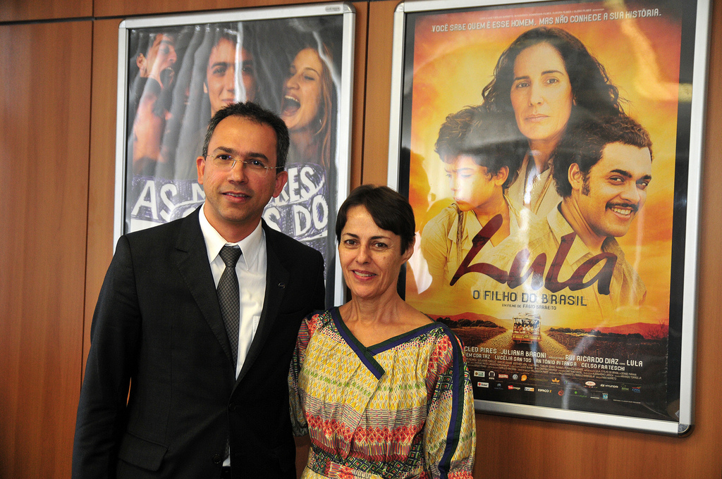 Reunião da Ministra da Cultura Ana de Hollanda com os membros da sociedade civil que fazem parte do Conselho Superior de Cinema na Ancine, Rio de Janeiro. Diretor-Presidente da Ancine, Manoel Rangel, e a Ministra da Cultura, Ana de Hollanda. Foto: André Melo